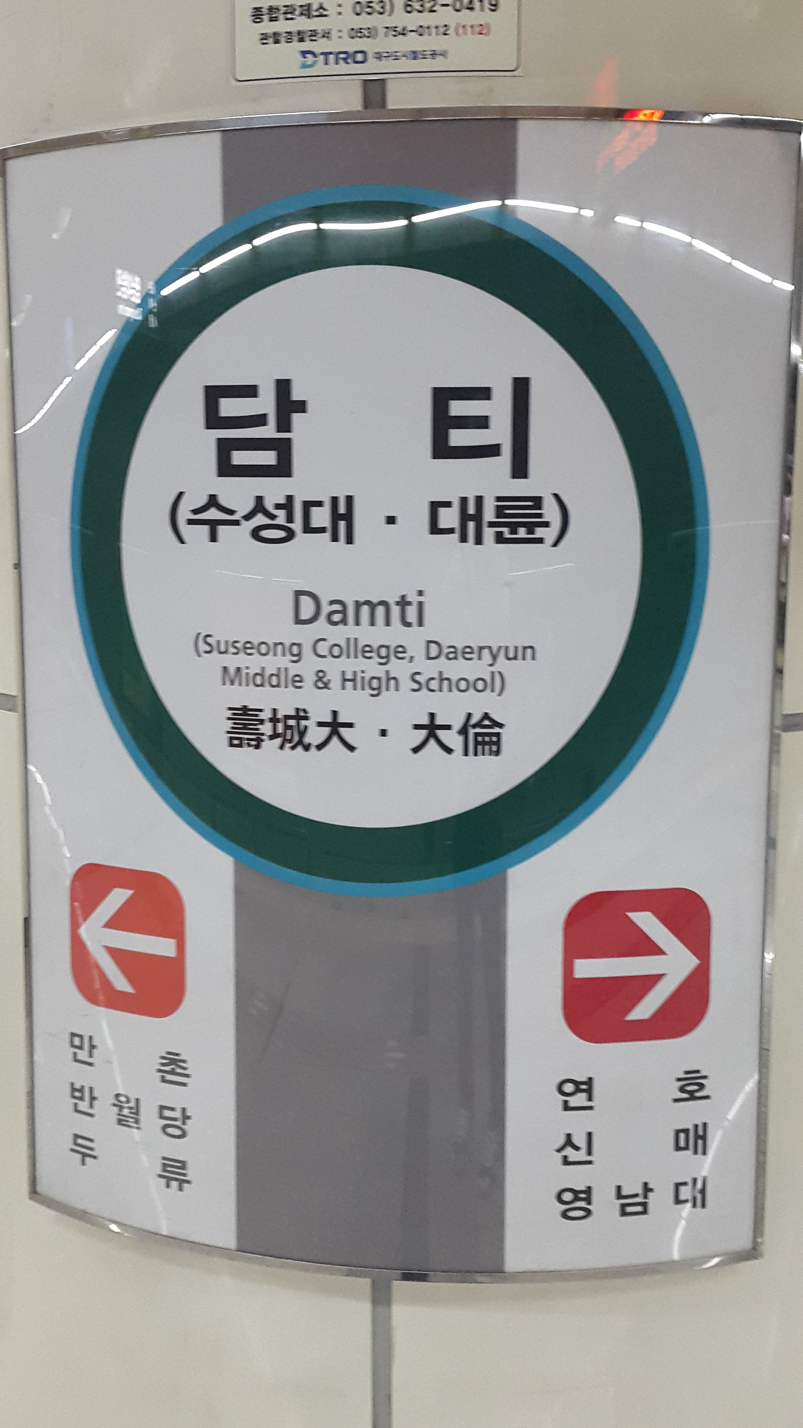 담티역 기둥 표지판